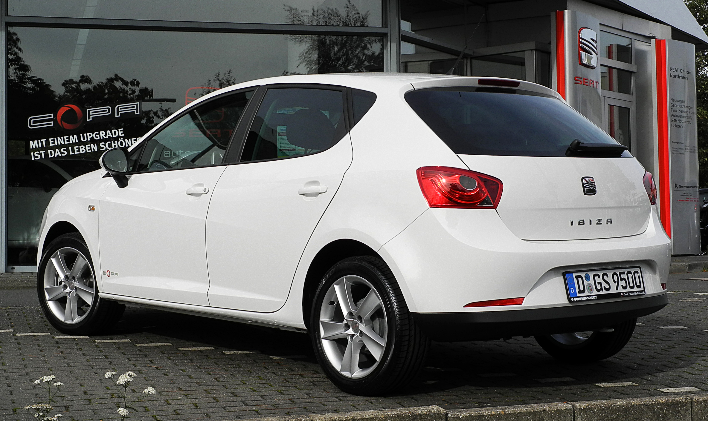 Seat Ibiza Copa (6J)